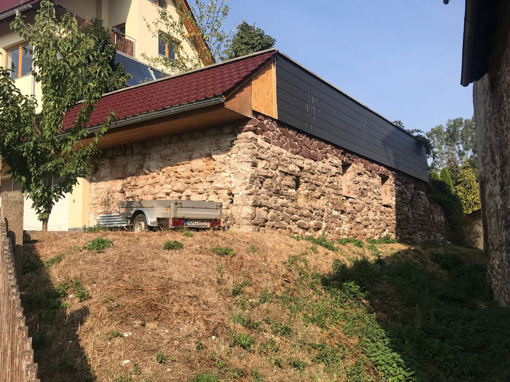 Reste der Alten Burg in Krimderode, Thüringen